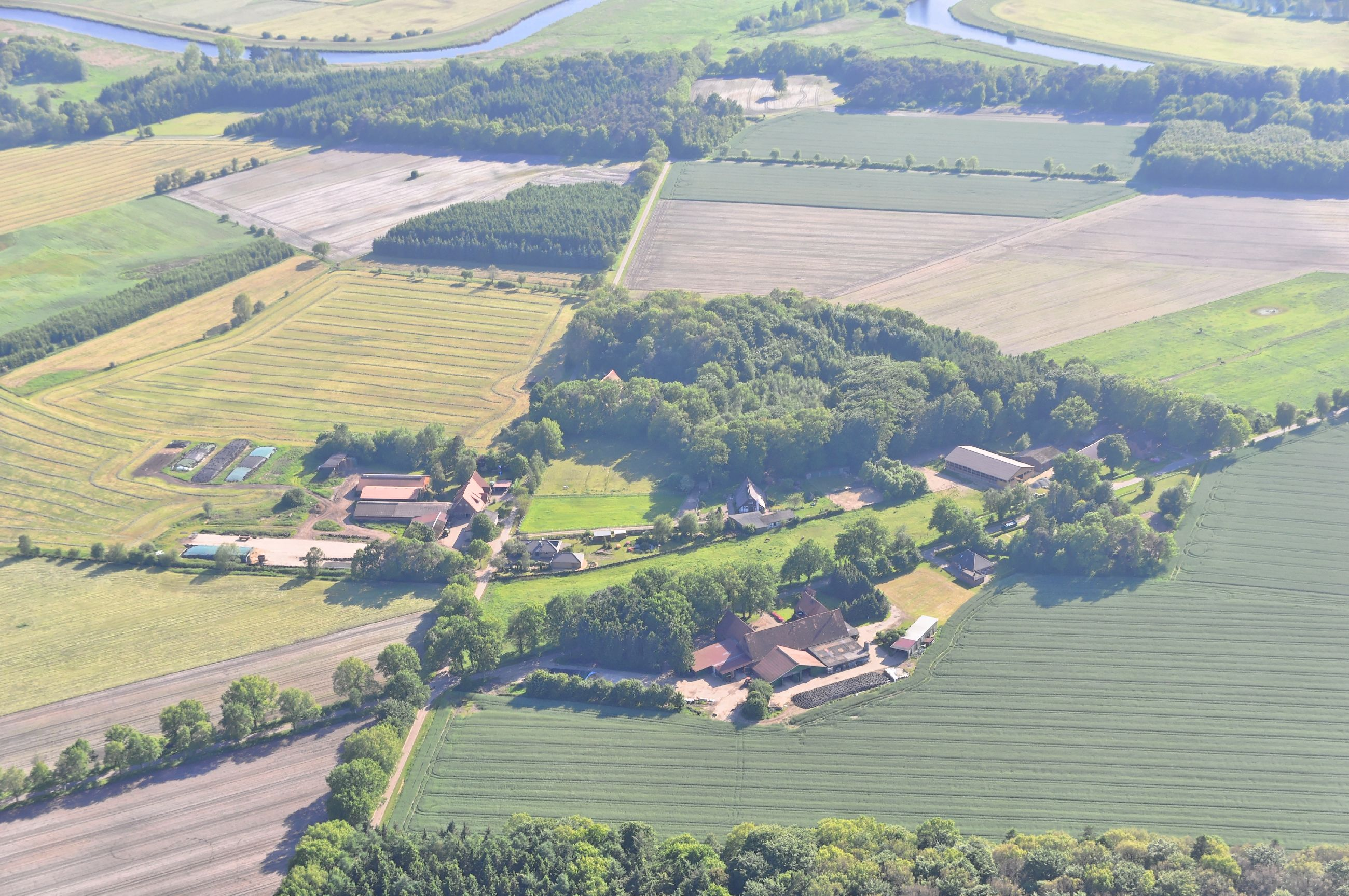 Überführungsflug vom Flugplatz Nordholz-Spieka über Lüneburg, Potsdam zum Flugplatz Schwarzheide-Schipkau